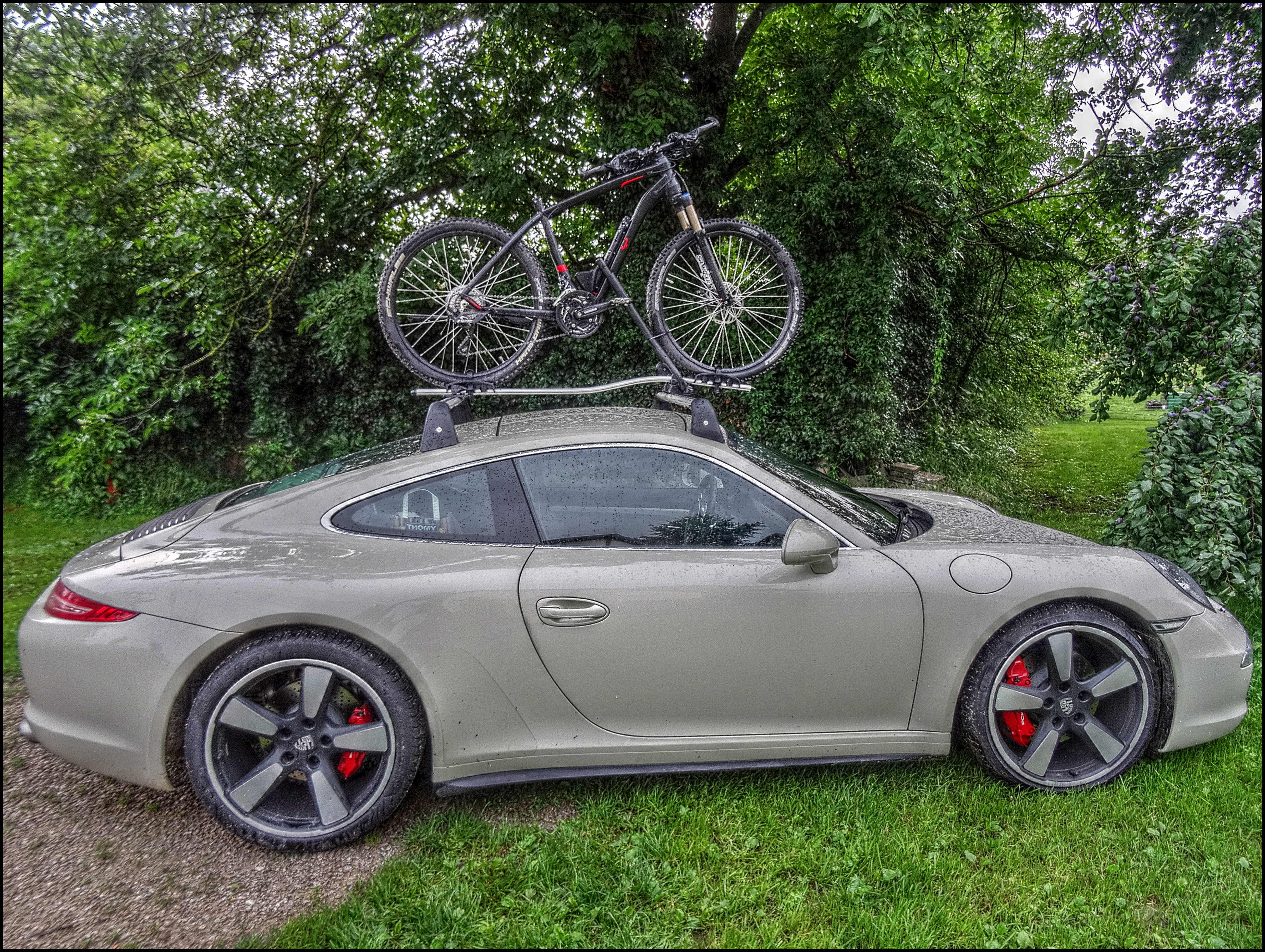 A very fast biker..!